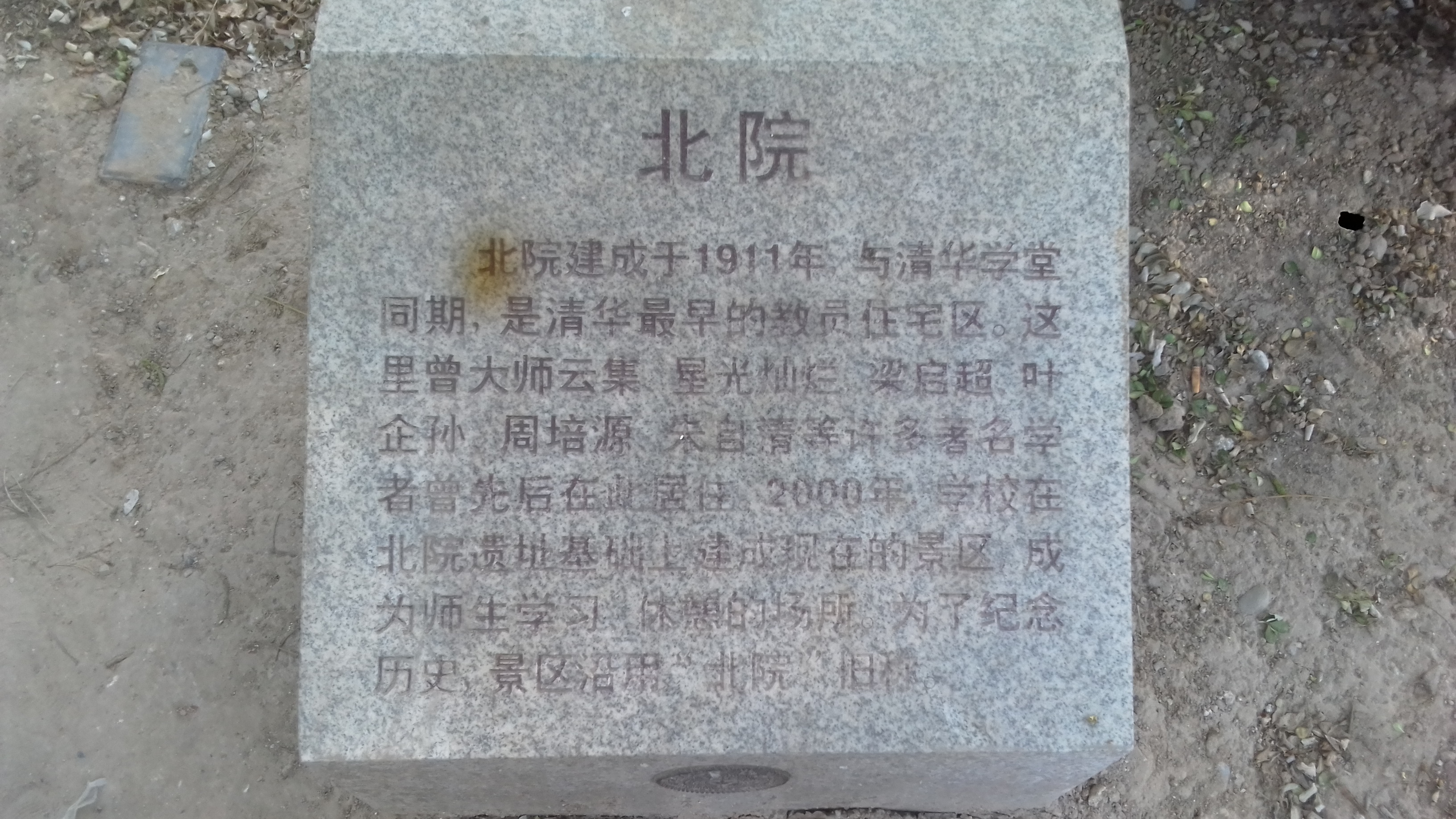 清華大學北院公園